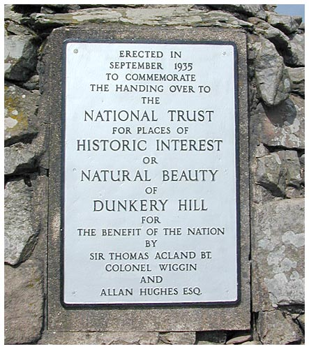 Dunkery plaque